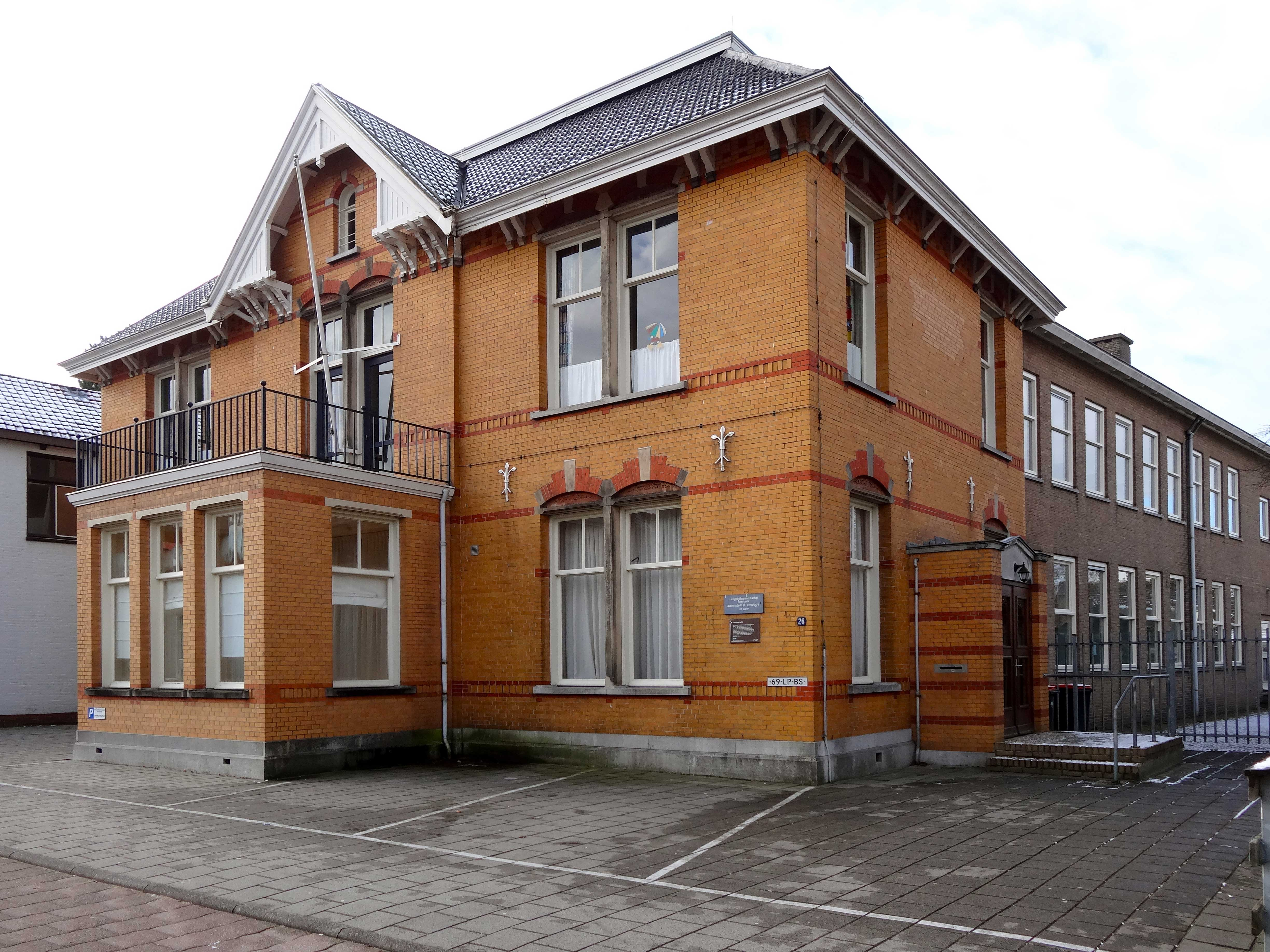 Gebouw van het voormalig kantongerecht in Hoogeveen